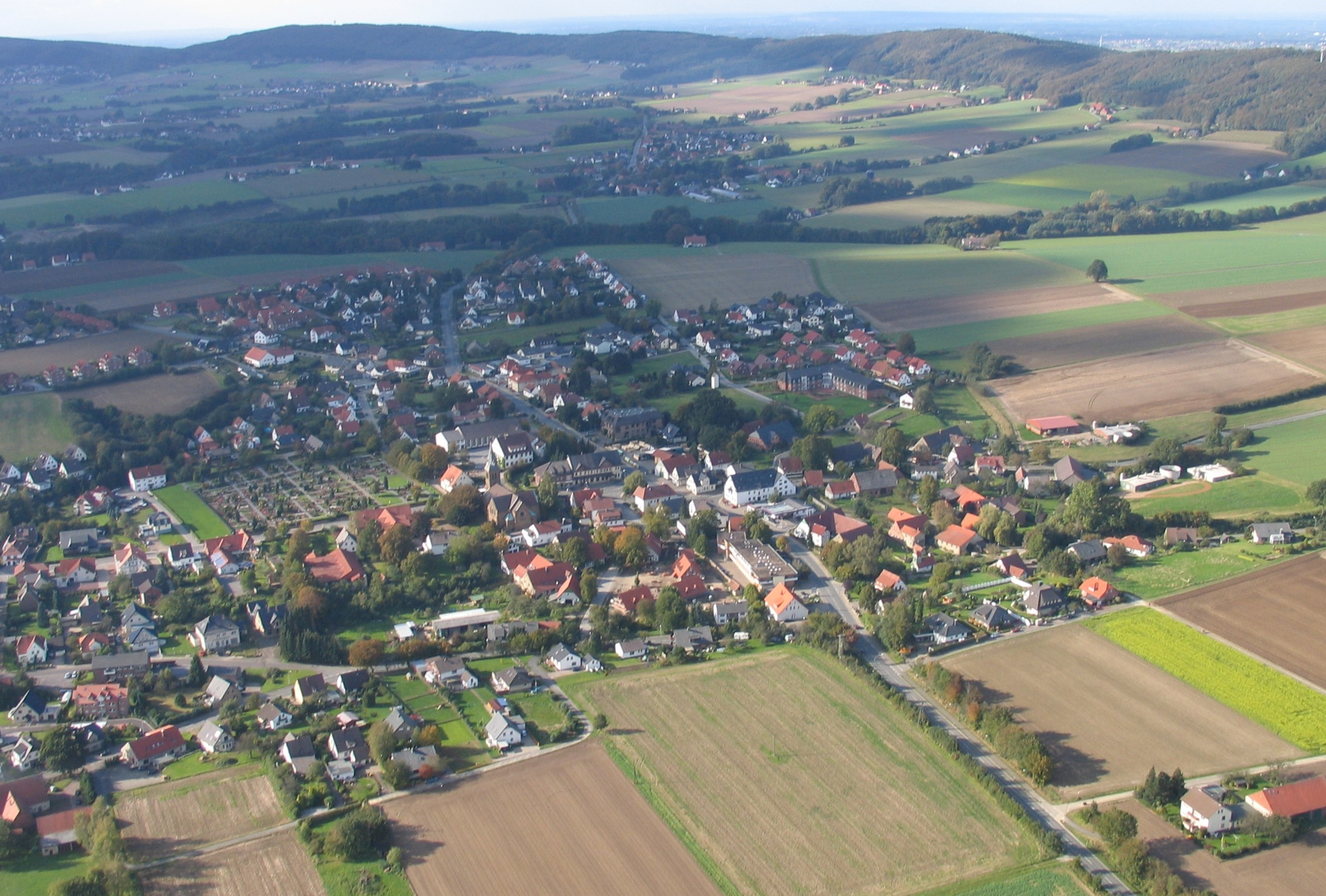 Luftbild Schnathorst / Wiehengebirge